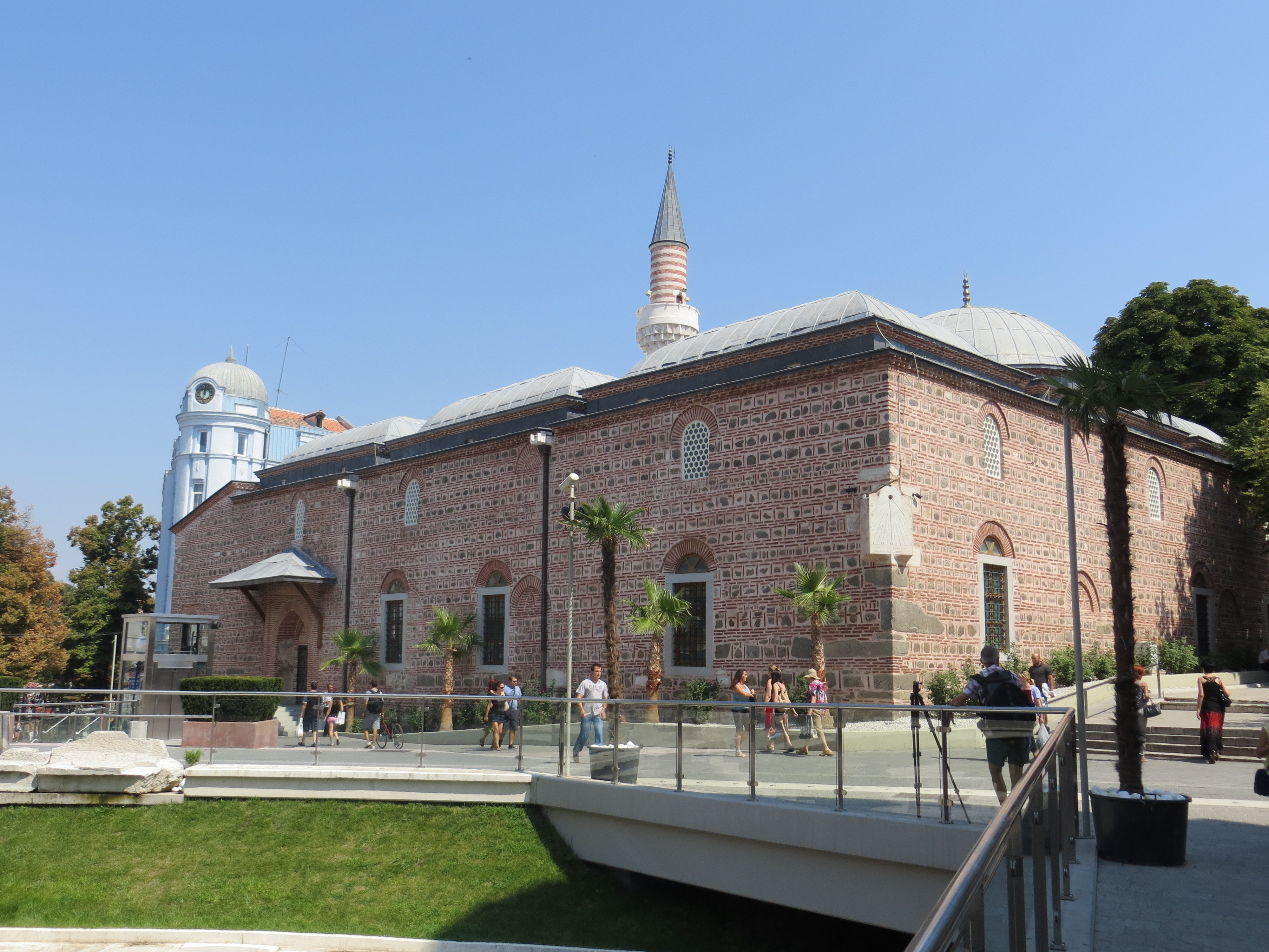 Die Bulgarische Großstadt Plovdiv